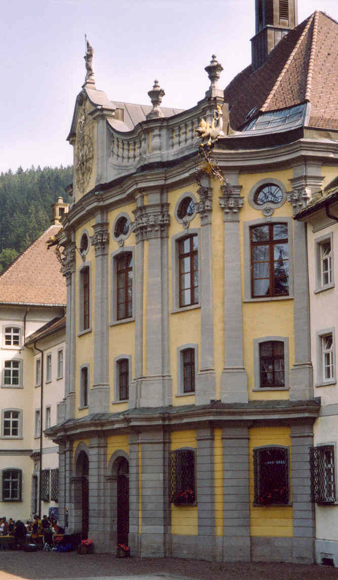 Sankt Blasien. Barocke Prachtpartie des riesigen und ansonsten vor allem nüchternen Konventbaus der ehemaligen Benediktiner-Abtei. Pilaster-strotzend!